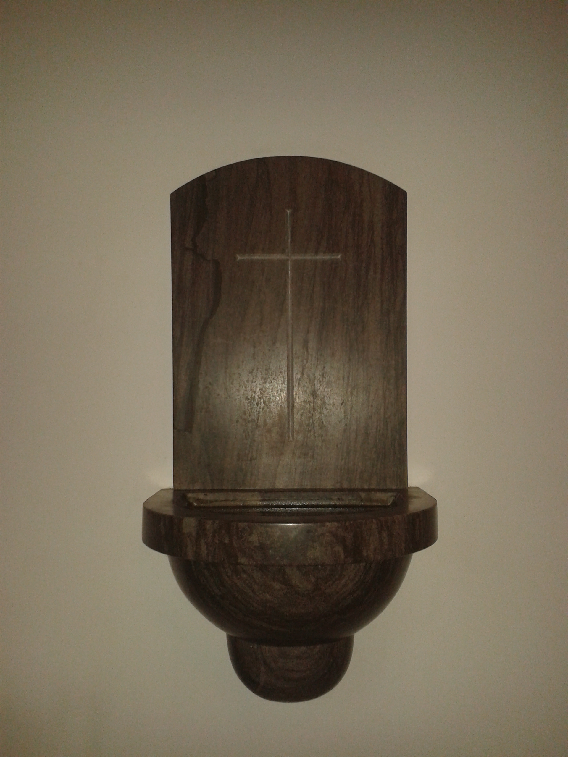 Situé dans l'entrée de l'édifice religieux.